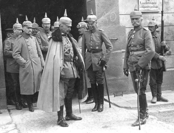 Der Kaiser [Wilhelm II.] und Generalfeldmarschall [August] von Mackensen auf dem südöstlichen Kriegsschauplatz